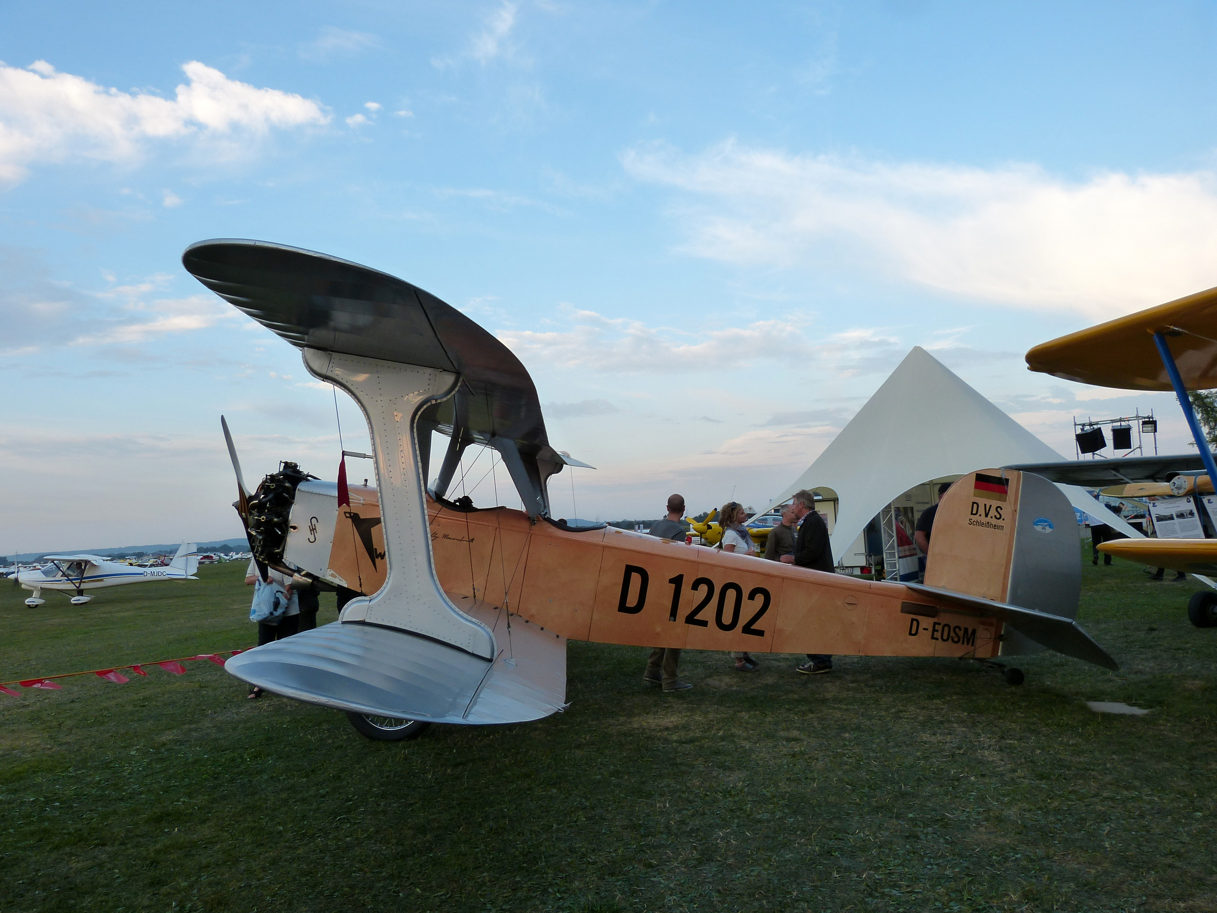 Tannkosh 2013 - Udet U 12